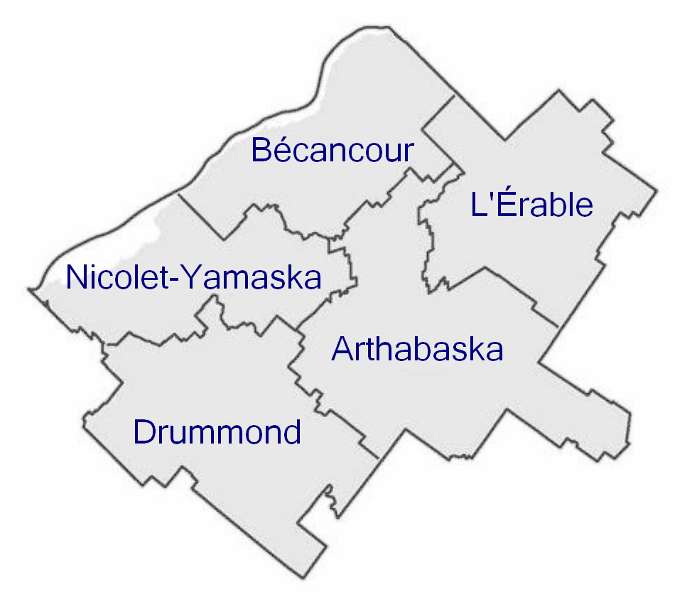 MRC du Centre-du-Québec